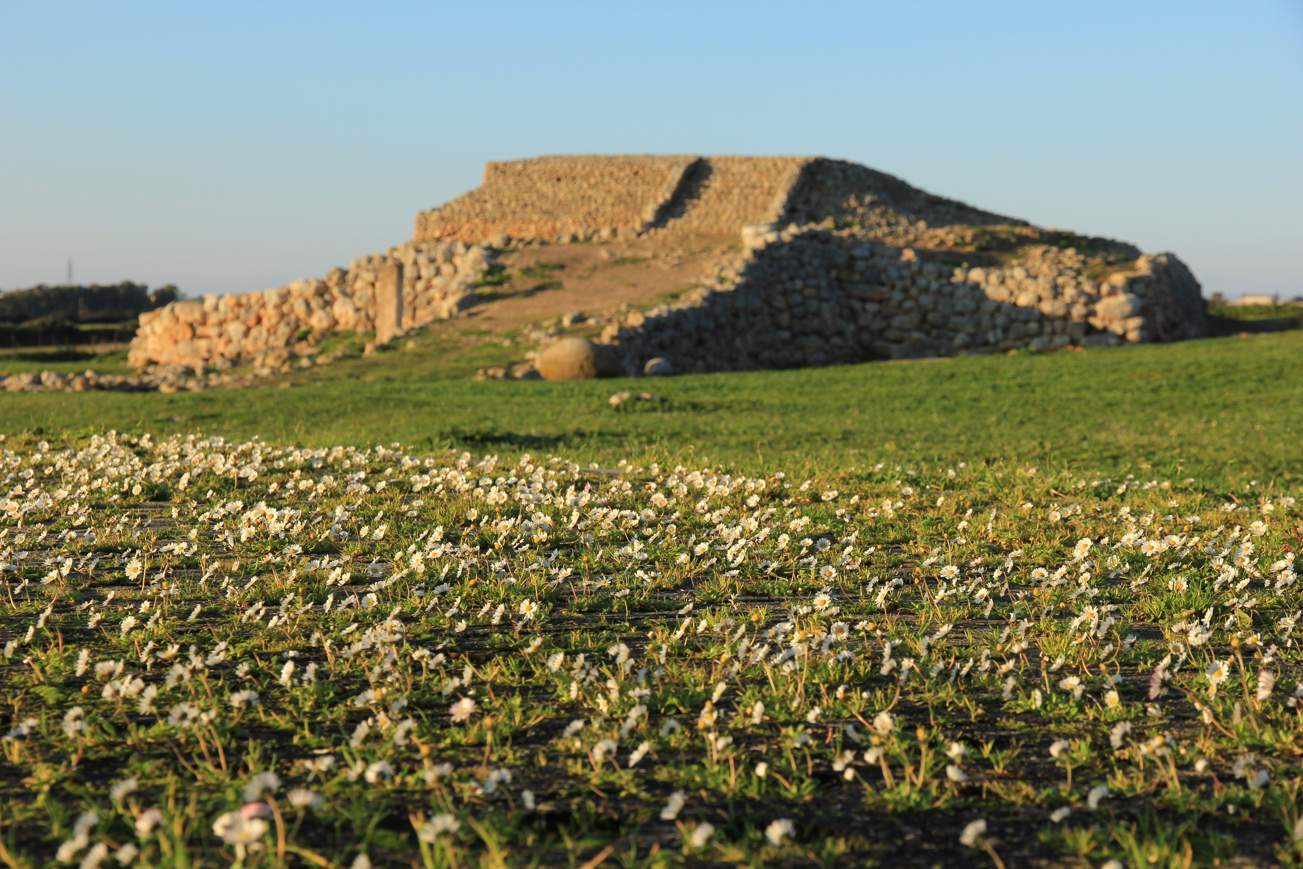 Sassari - Complesso prenuragico di Monte d'Accoddi